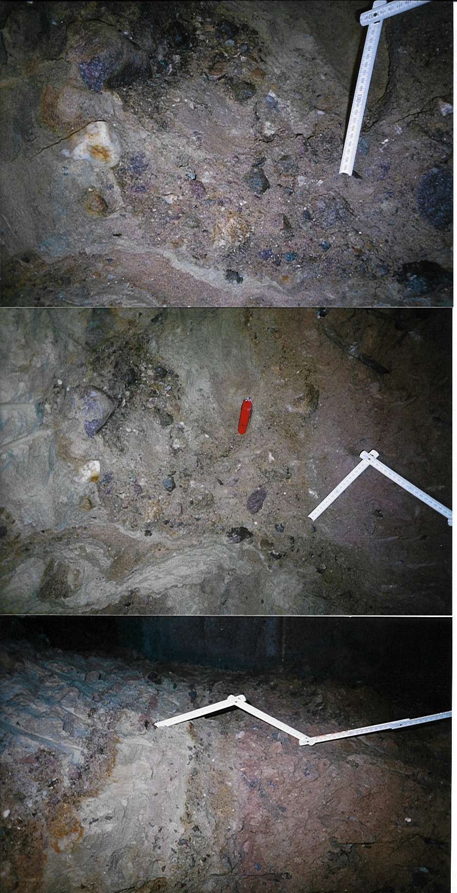 St. Magdalena bei Bozen Bodenprofile Aushub Grotte Weinkatakombe Bodenschichten.